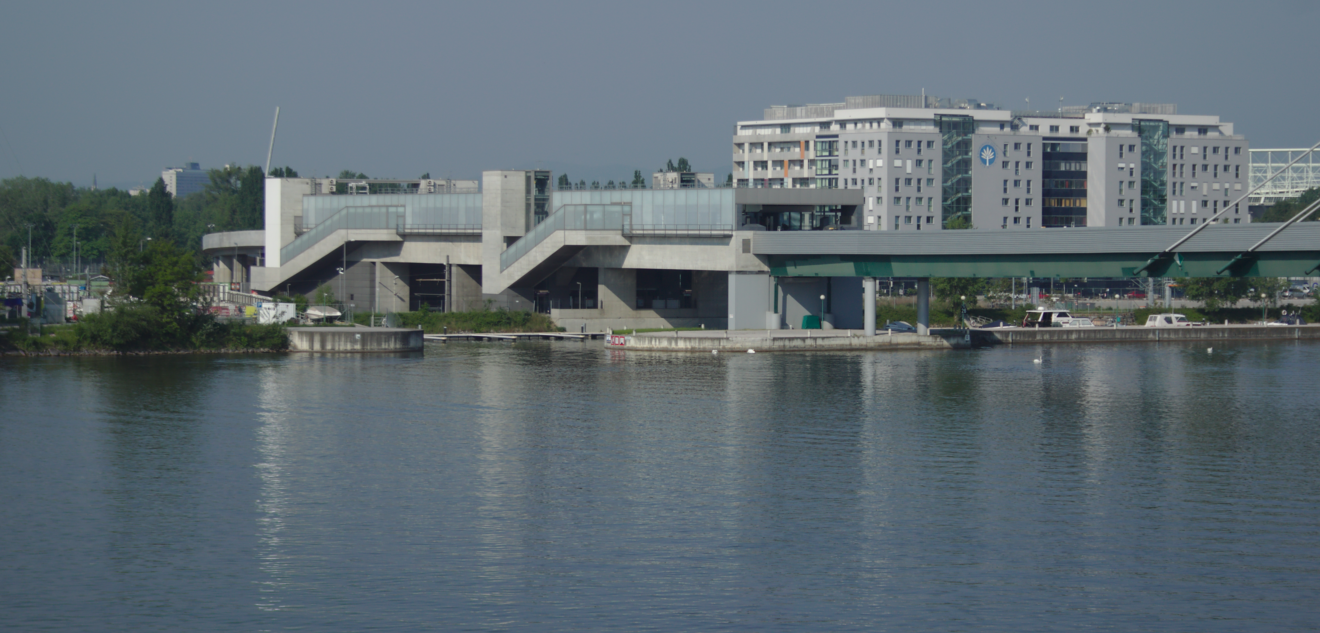 U-Bahn-Station Donaumarina von der Praterbrücke aus gesehen